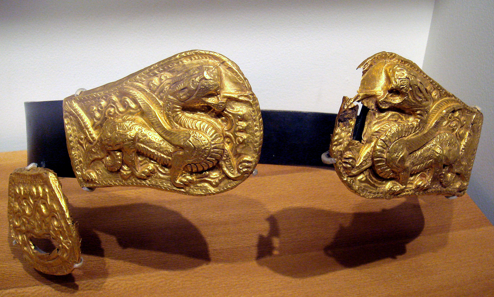 Belt Buckle Xianbei 3-4th century